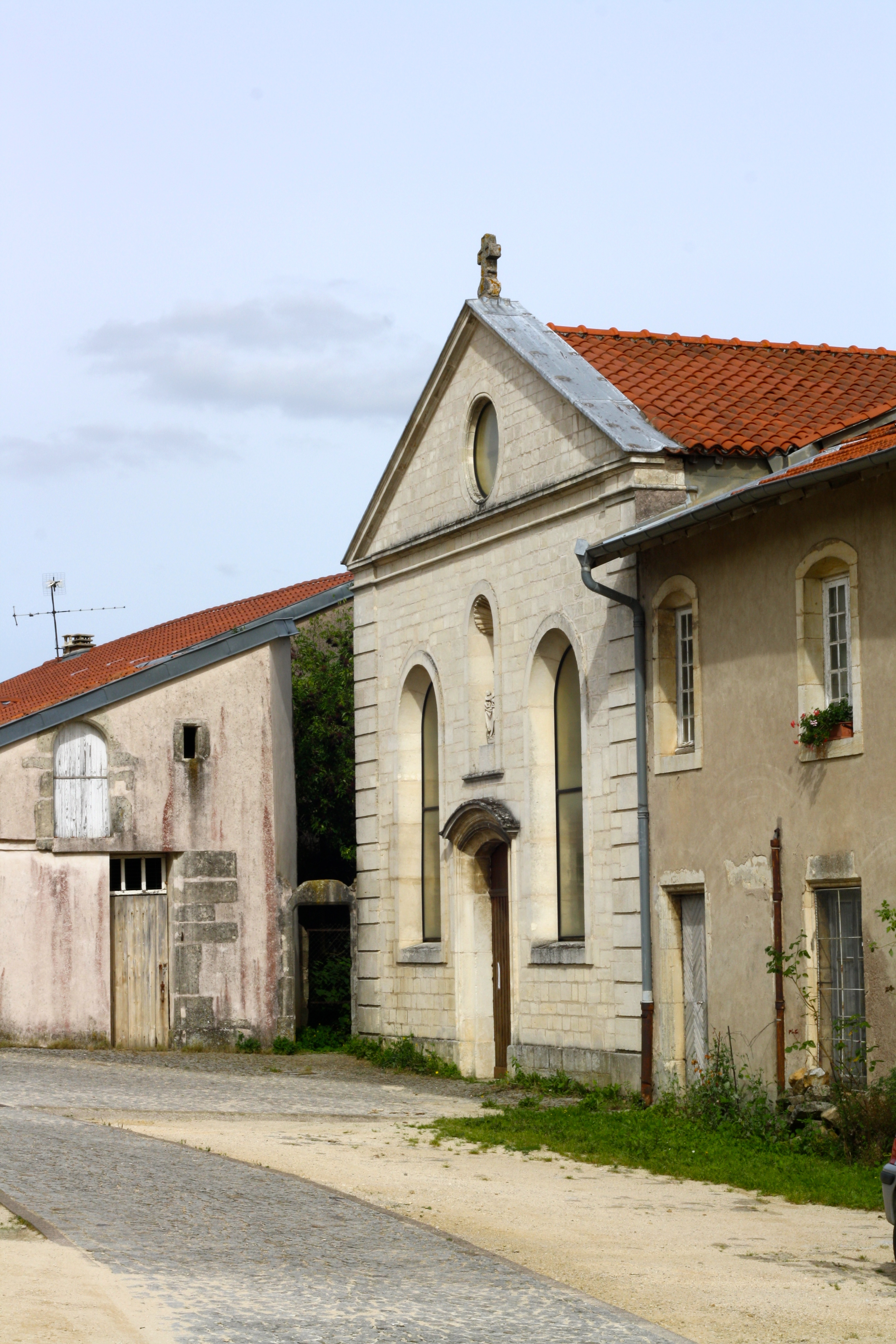 Chapelle de Blanzey : facade .